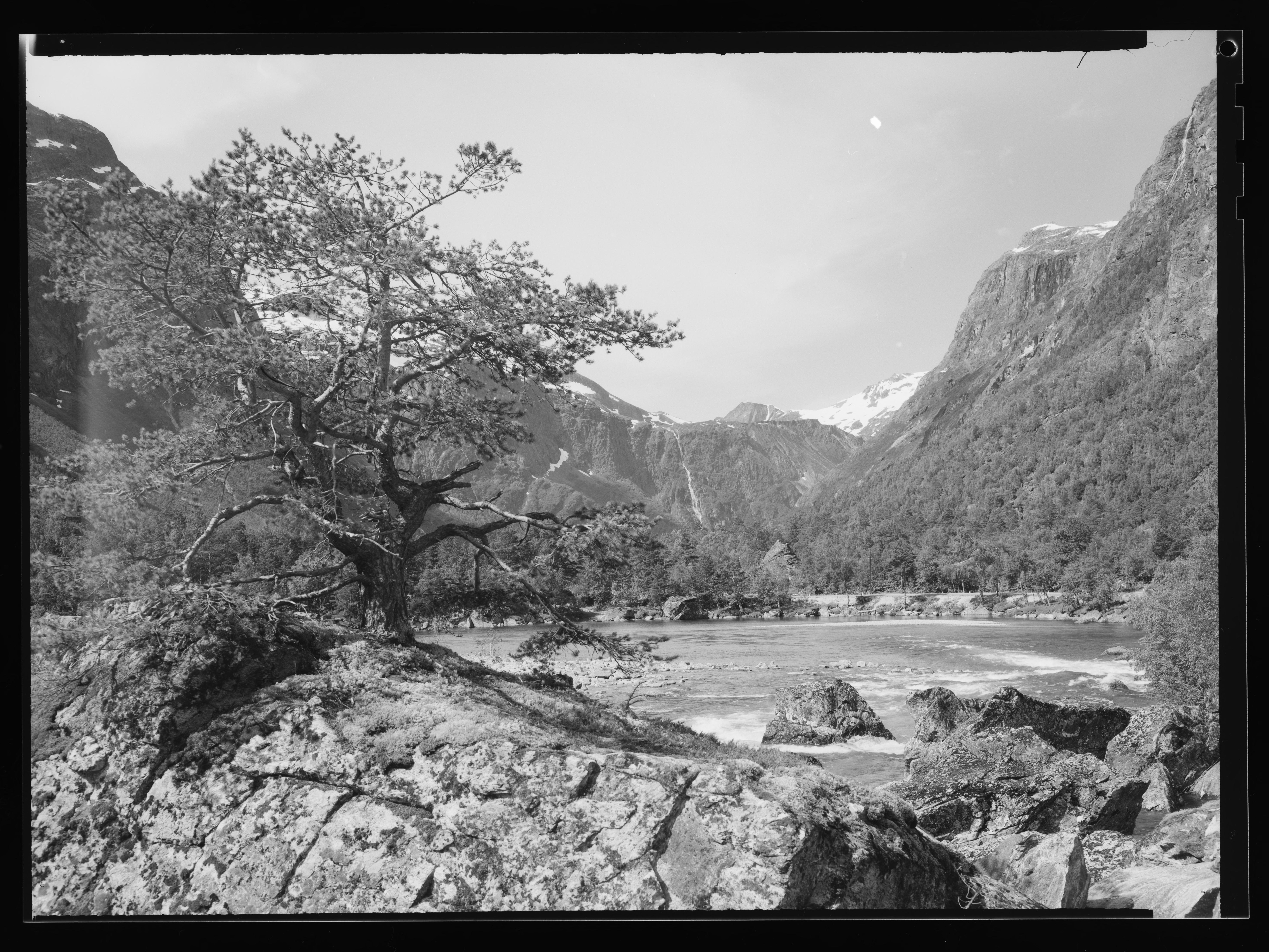 Bildet er hentet fra Nasjonalbibliotekets bildesamling Flatmark,Romsdalen, Rauma, Møre og Romsdal